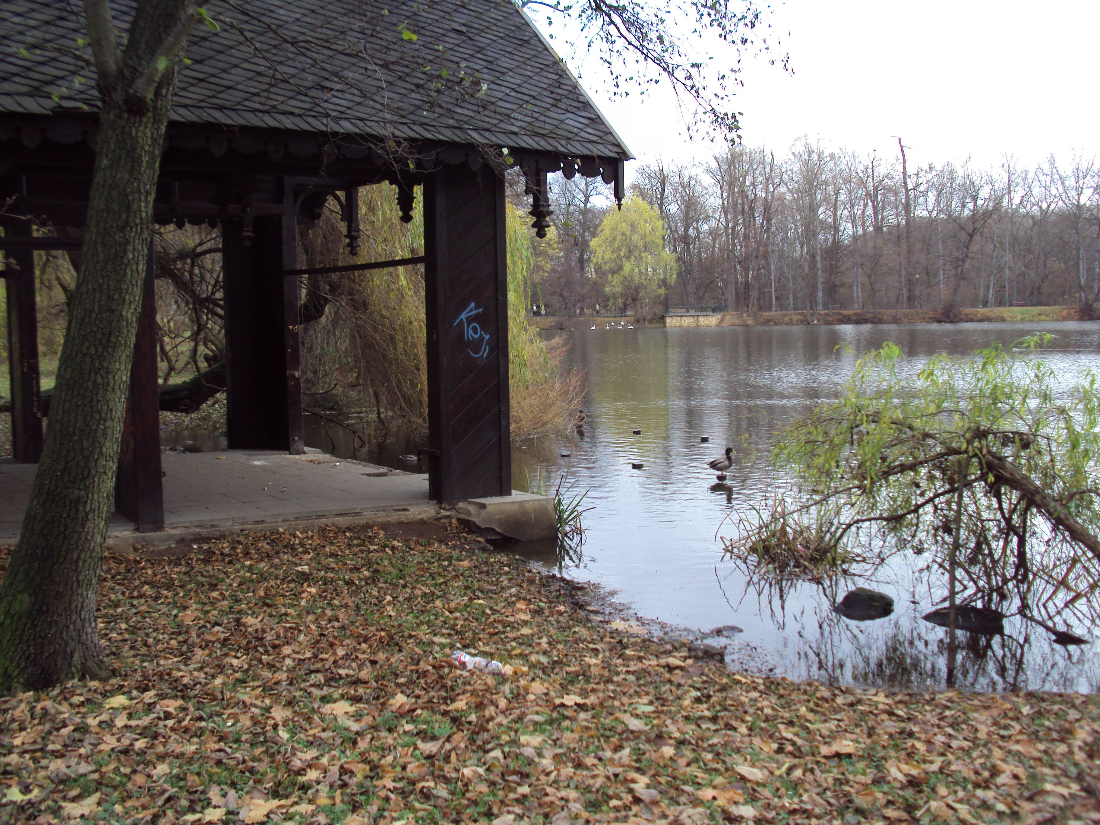 Altán Labutí domek na břehu Velkého zámeckého rybníka v Teplicích